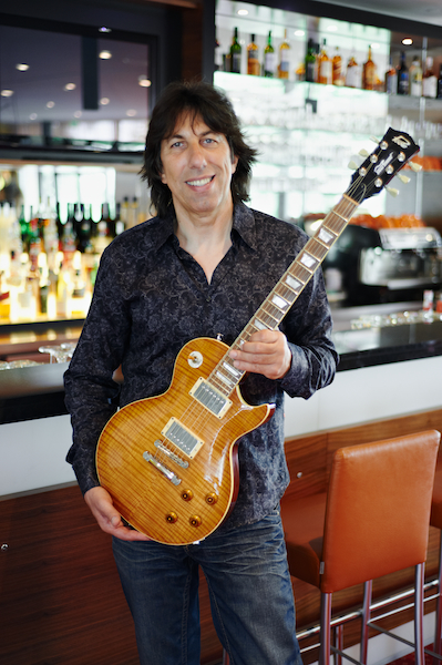 Promo 02